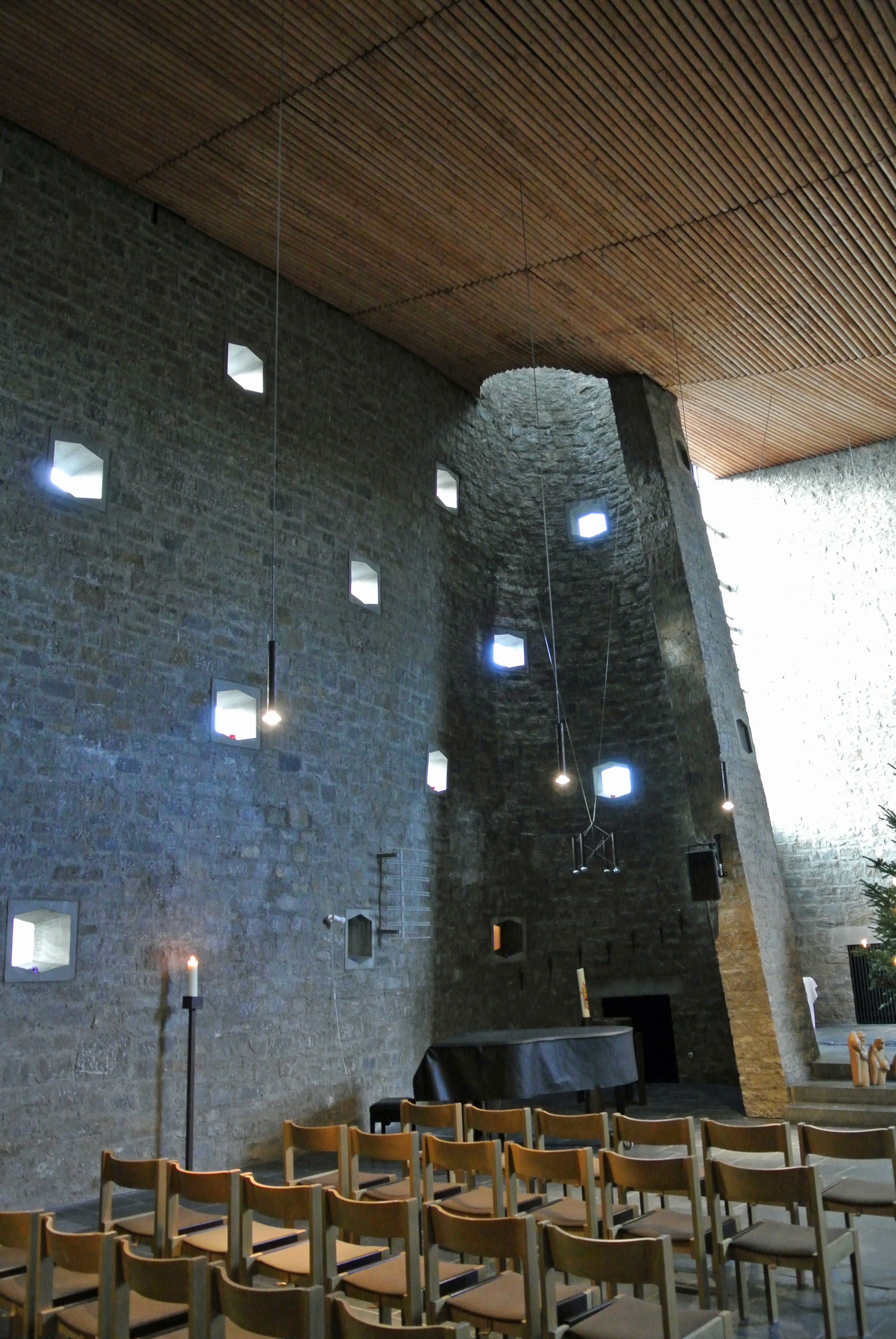 Dreifaltigkeitskirche in Frankfurt-Bockenheim-Kuhwaldsiedlung, Architekt: Werner Neumann, 1966 eingeweiht, Innenraum, Taufkapelle